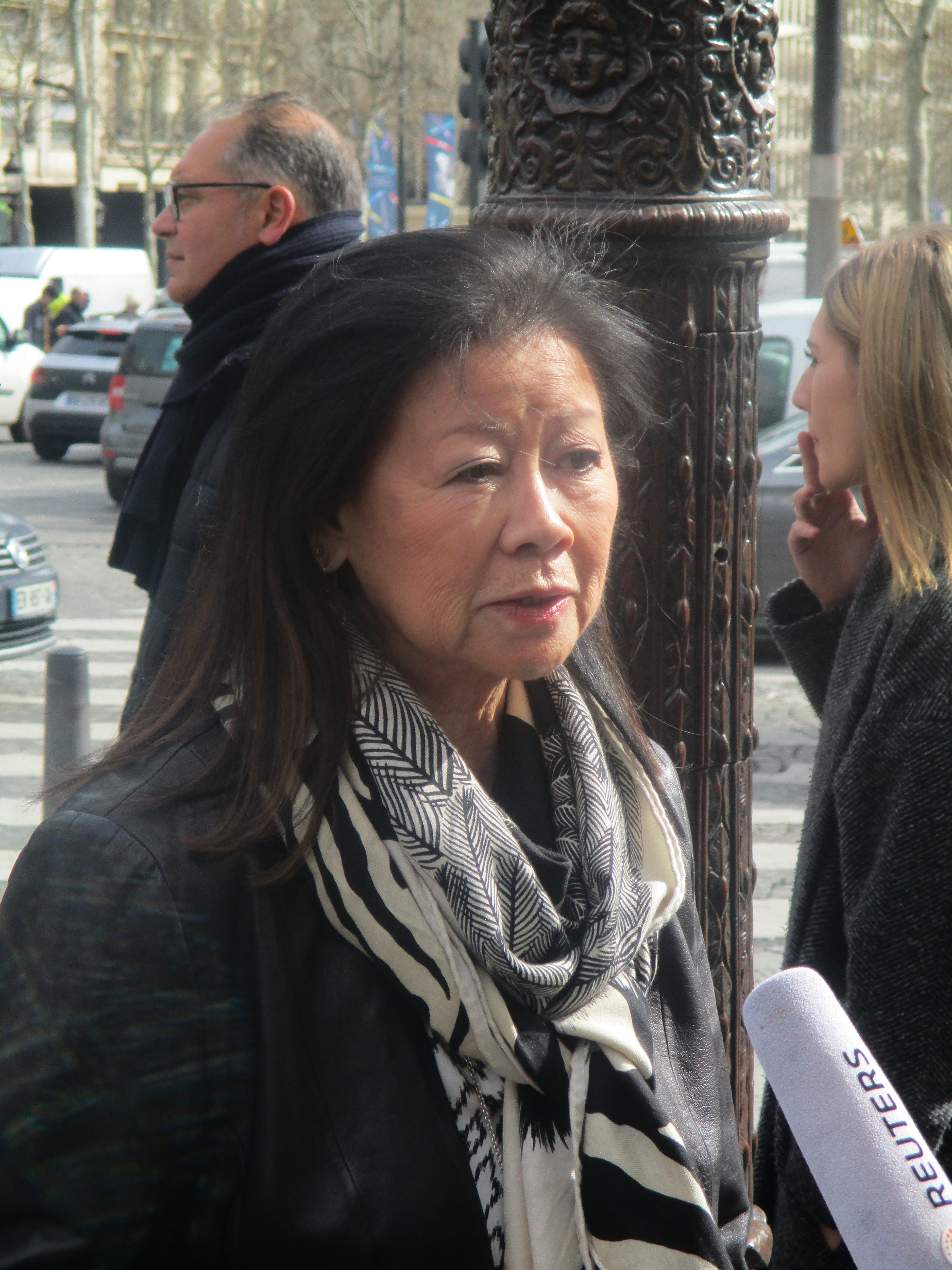 La maire du VIIIe arrondissement de Paris, Jeanne d'Hauteserre, interviewée par l'agence Reuters au surlendemain de la manifestation des gilets jaunes du 16 mars 2019 qui a causé des dommages sur l'avenue des Champs-Élysées.